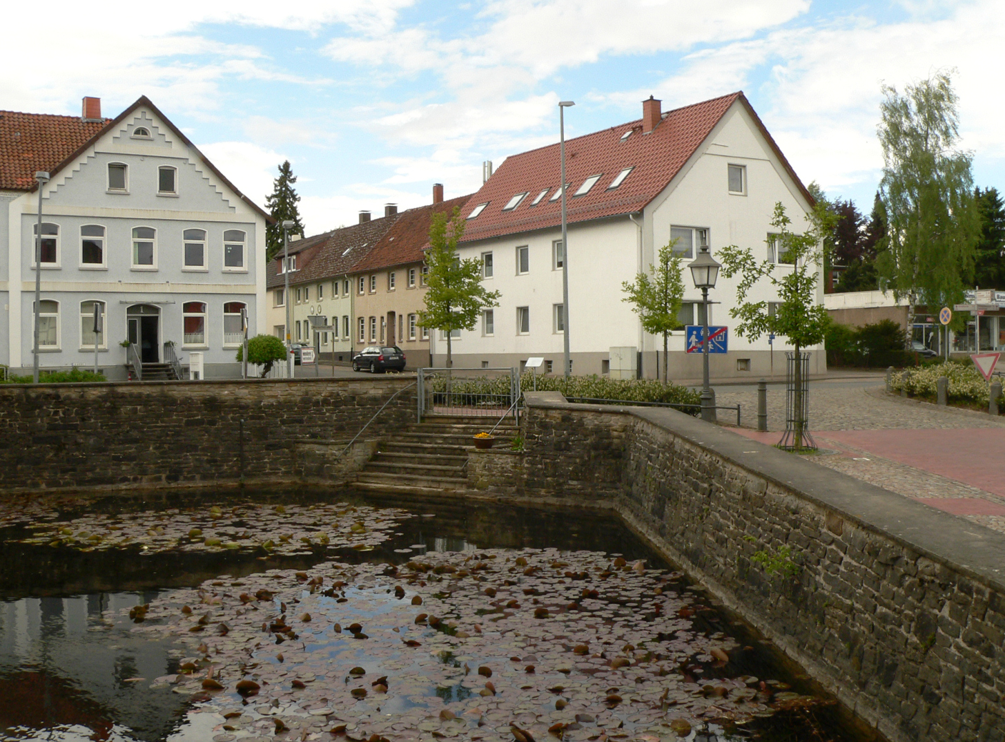 Feuerlöschteich in Bad Münder, in der Bildmitte die Infotafel zur Deportation jüdischer Mitbürger aus Bad Münder im Jahr 1942